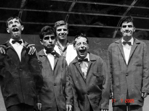 Autore della foto: Ettore Bruno. La fonte è lo stesso signor Bruno, che me l'ha fornita. Raffigura i Brutos negli anni '60